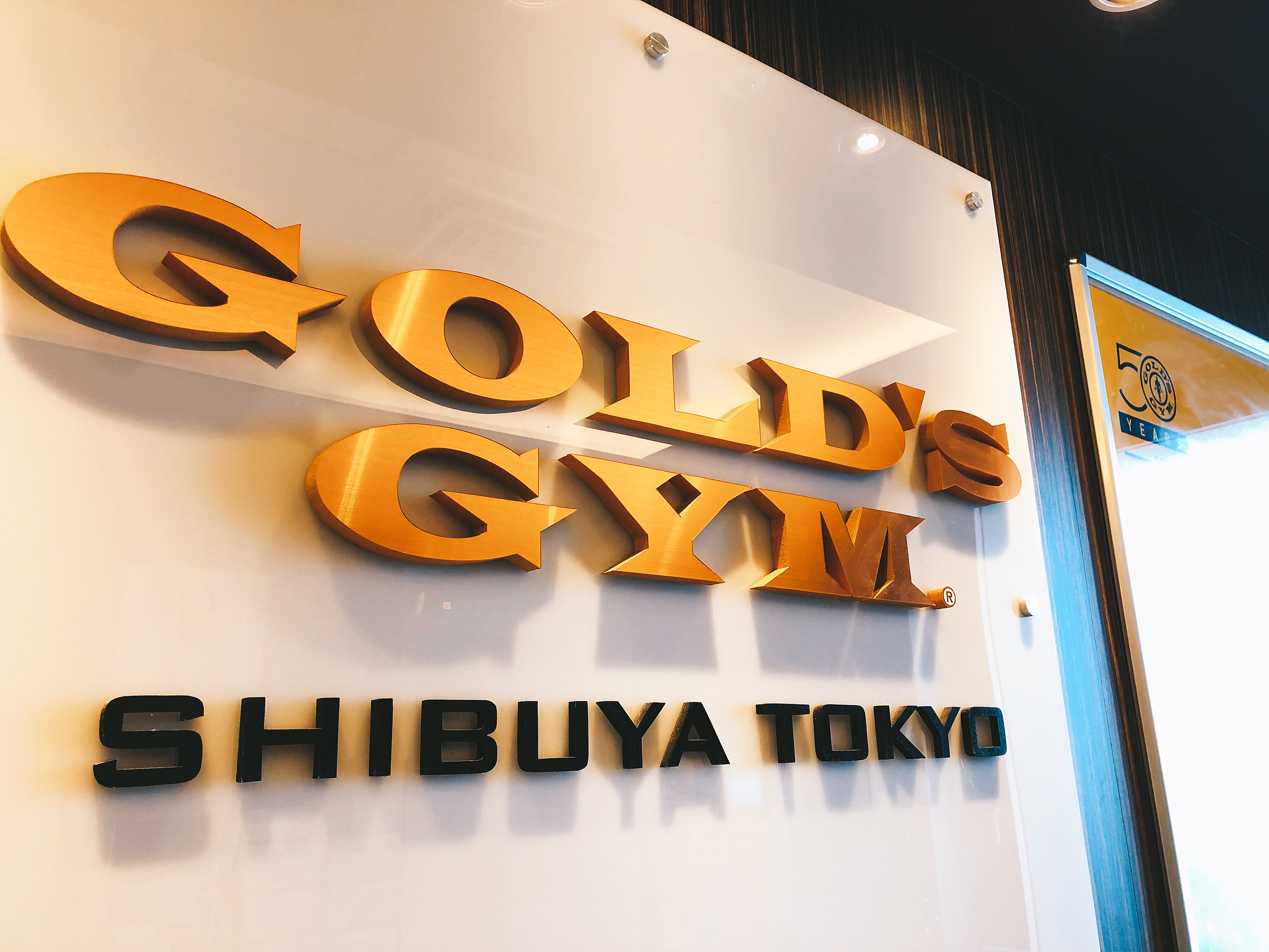 ゴールドジム渋谷店入り口